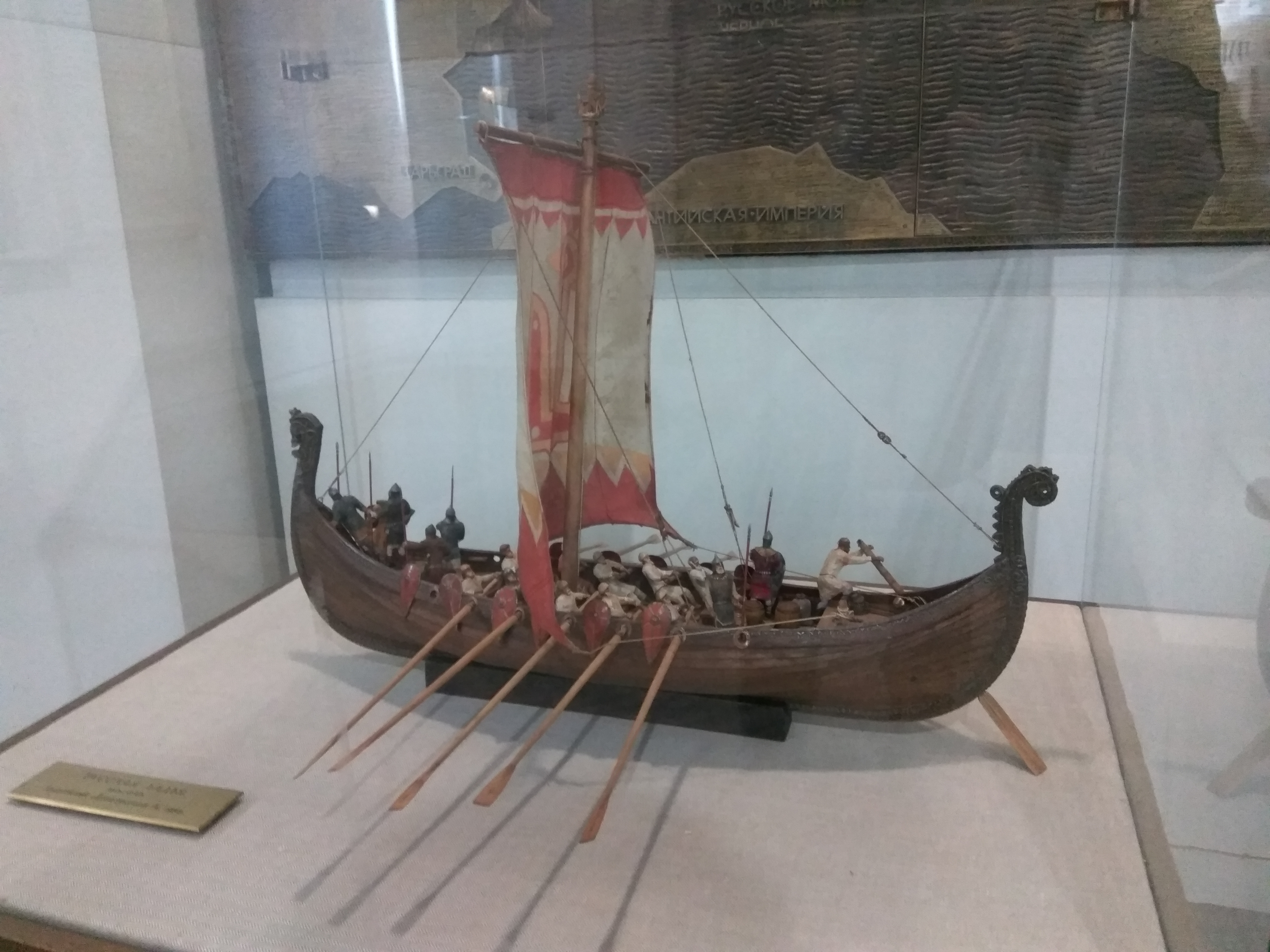 Магілёўскі абласны краязнаўчы музей. Гісторыя краю з IX ст. да 1917 г. Шлях з варагаў у грэкі. Мадэль старажытнарускай ладдзі